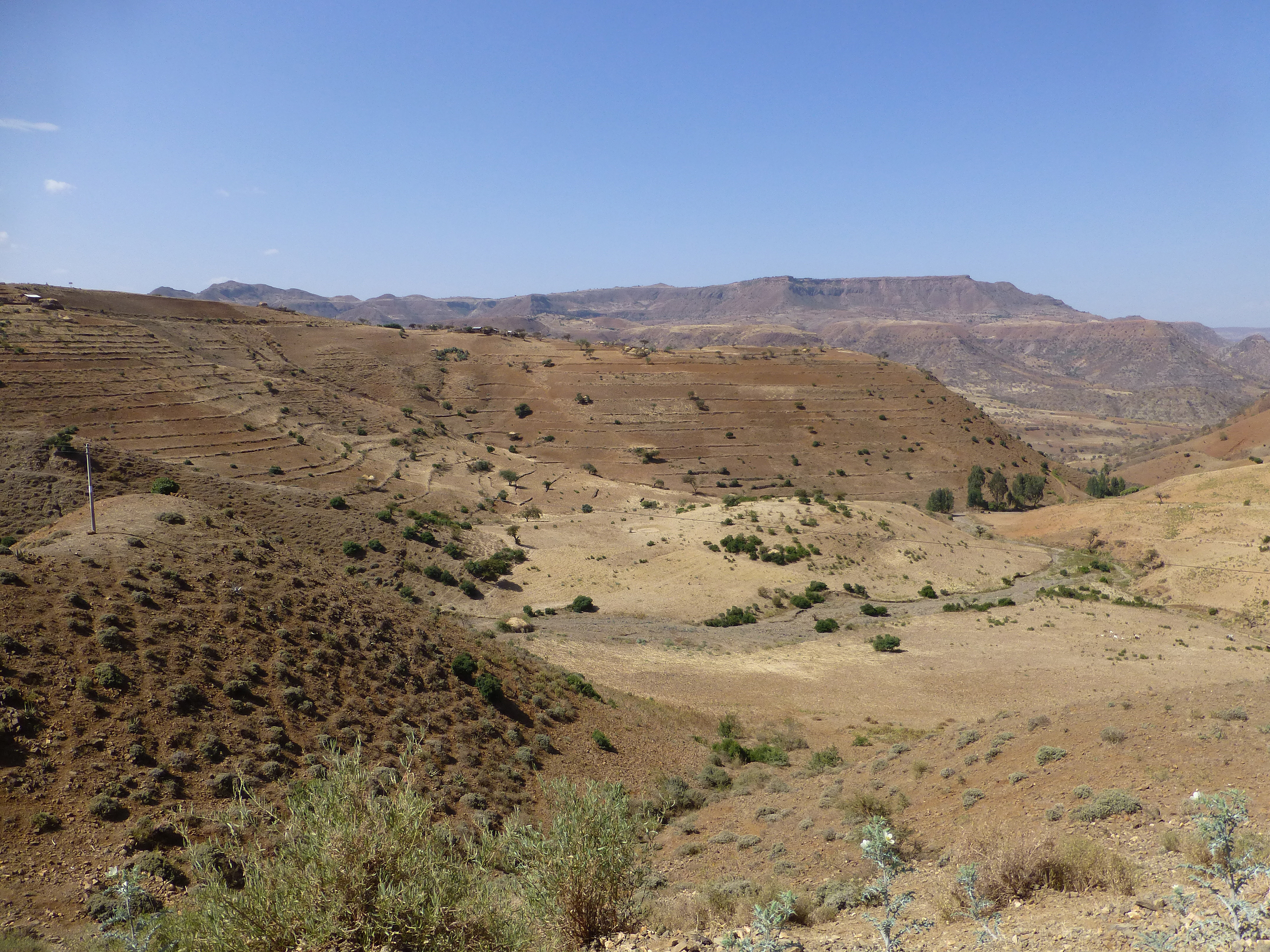 Hauts plateaux éthiopiens à quelques kilomètres au nord de Sekota (région Amhara)